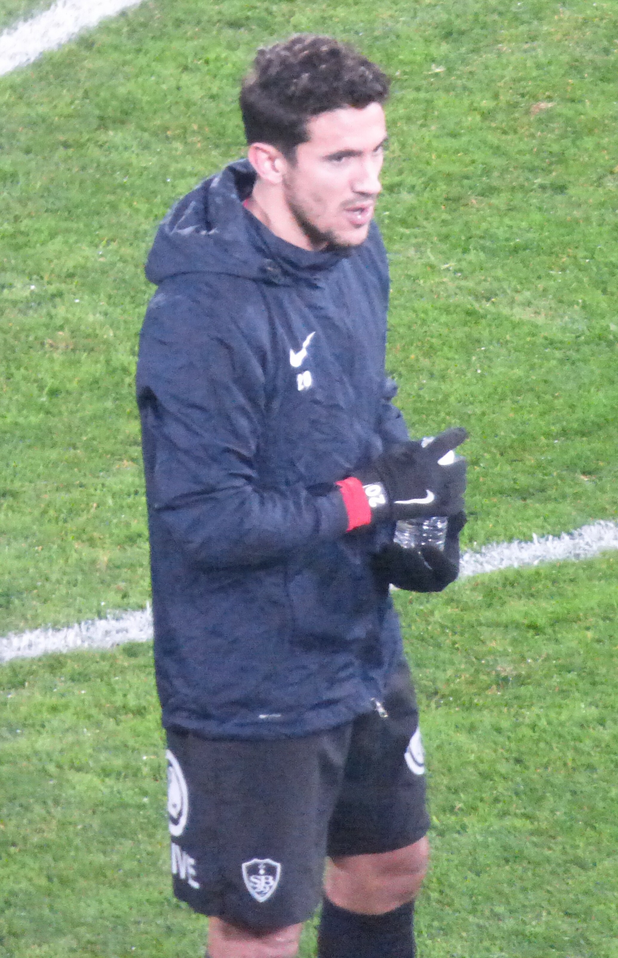 Gaëtan Belaud avant le match RC Lens / Stade brestois, le 4 décembre 2018, comptant pour la dix-septième journée du championnat de France de football de Ligue 2 2018-2019, au Stade Bollaert-Delelis.